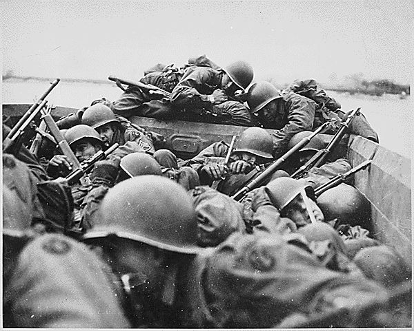 Sankt_Goar_Rheinueberquerung_Maerz_1945 ARC Identifier: 535978 "I drew an assault boat to cross in-just my luck. We all tried to crawl under each other because the lead was flying around like hail." Crossing the Rhine under enemy fire at Saint Goar, March 1945. Army. , 1941 - 1945